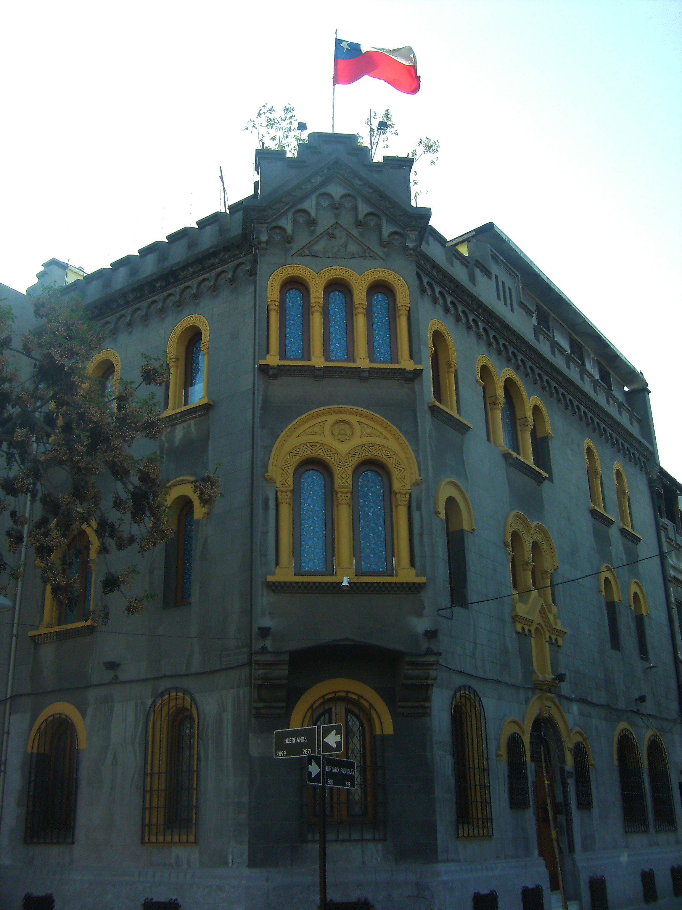 Calle Hurtado Rodríguez en Barrio Yungay This is a photo of a national monument in Chile: 892